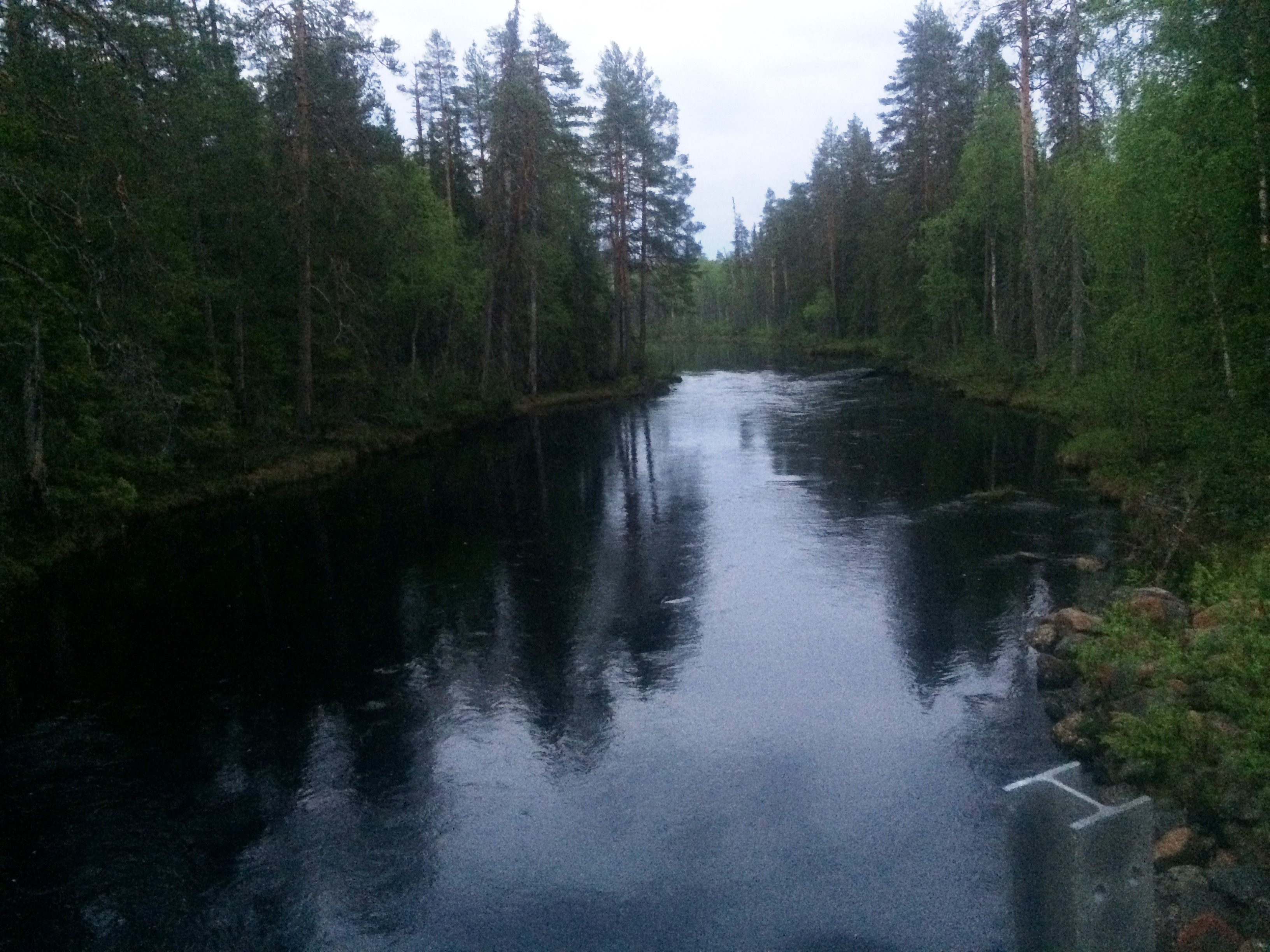 Пенинга (река)